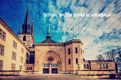 Catedral de Luxemburgo